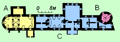 Поземна проекція замку Острозьких.